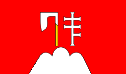 Flaga Krzeszowic.